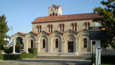 Ο Ιερός Ναός Αγίου Κωνσταντίνου και Αγίας Ελένης στην πλατεία της Μαλεσίνας